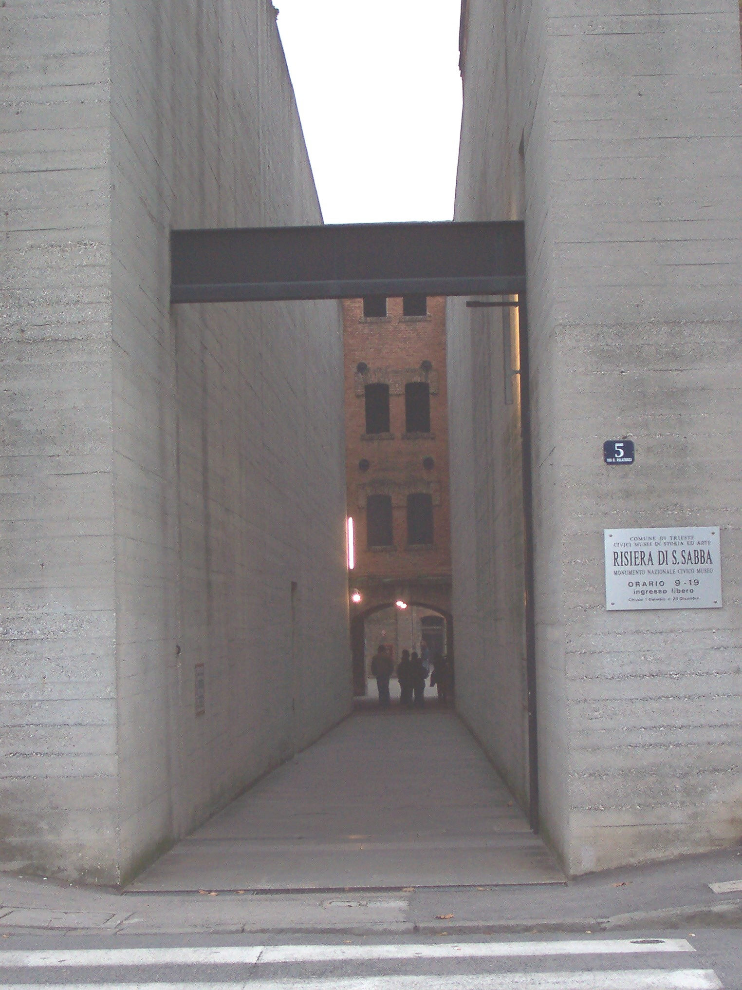 Ingresso alla Risiera di San Sabba a Trieste. Source photographed by myself Photographer Pier Luigi Mora Date 2005-10-30 Camera Data Camera Kodak CX6330 zoom digital camera